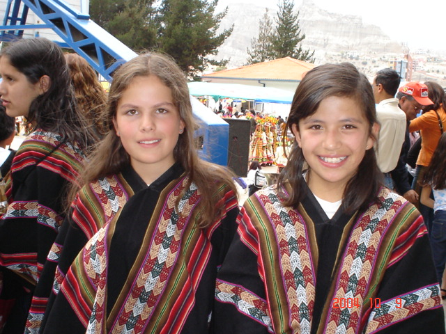 Estudiantes bolivianas con trajes típicos